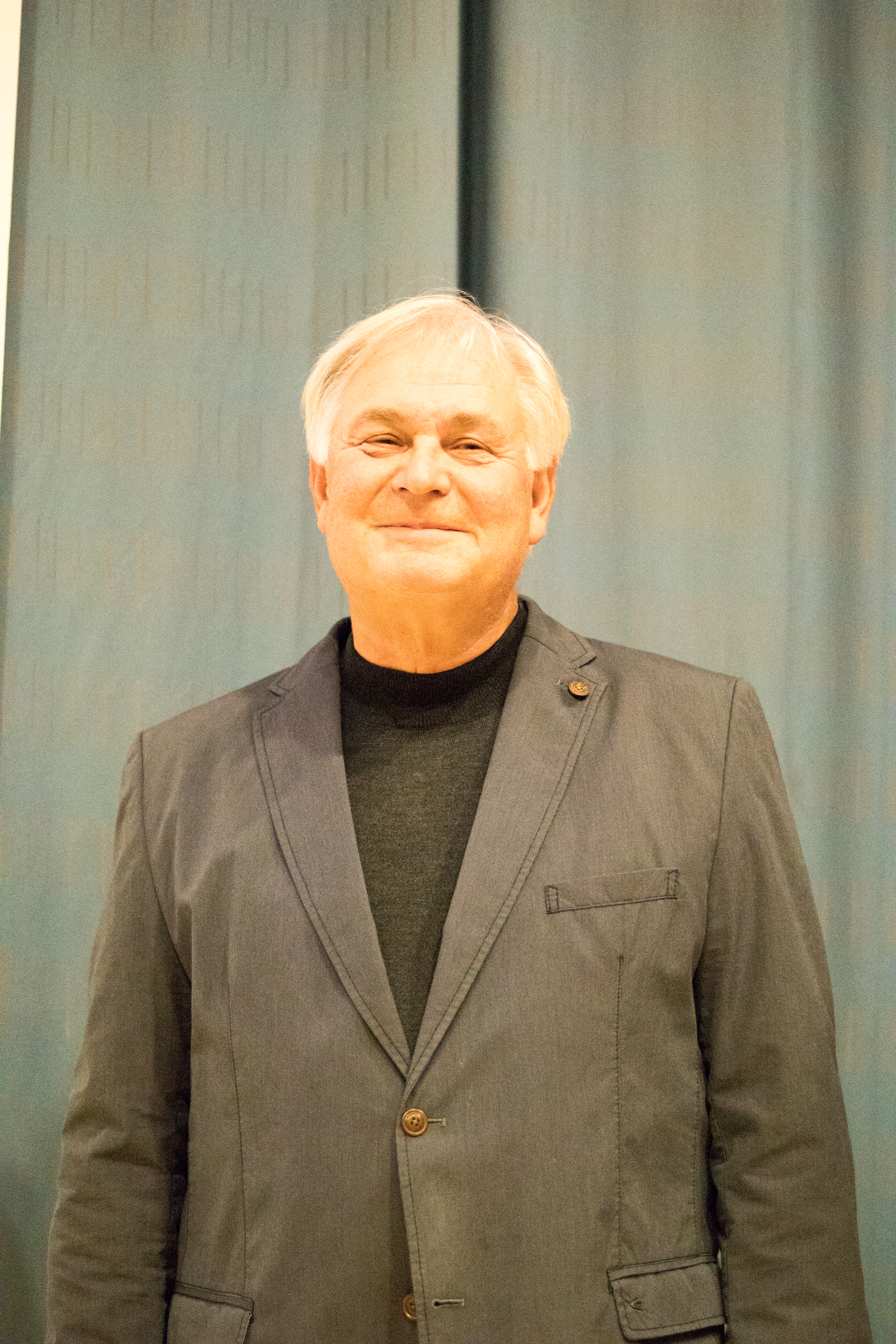 Jorma Tenovuo suomalainen valokuvaaja